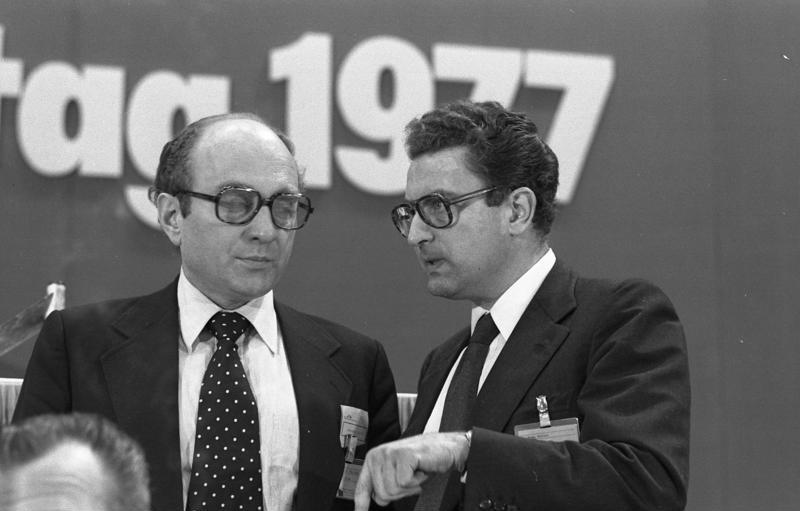 28. Ordentlicher Bundesparteitag der FDP in der Kieler Ostseehalle. 6.-8.11.1977